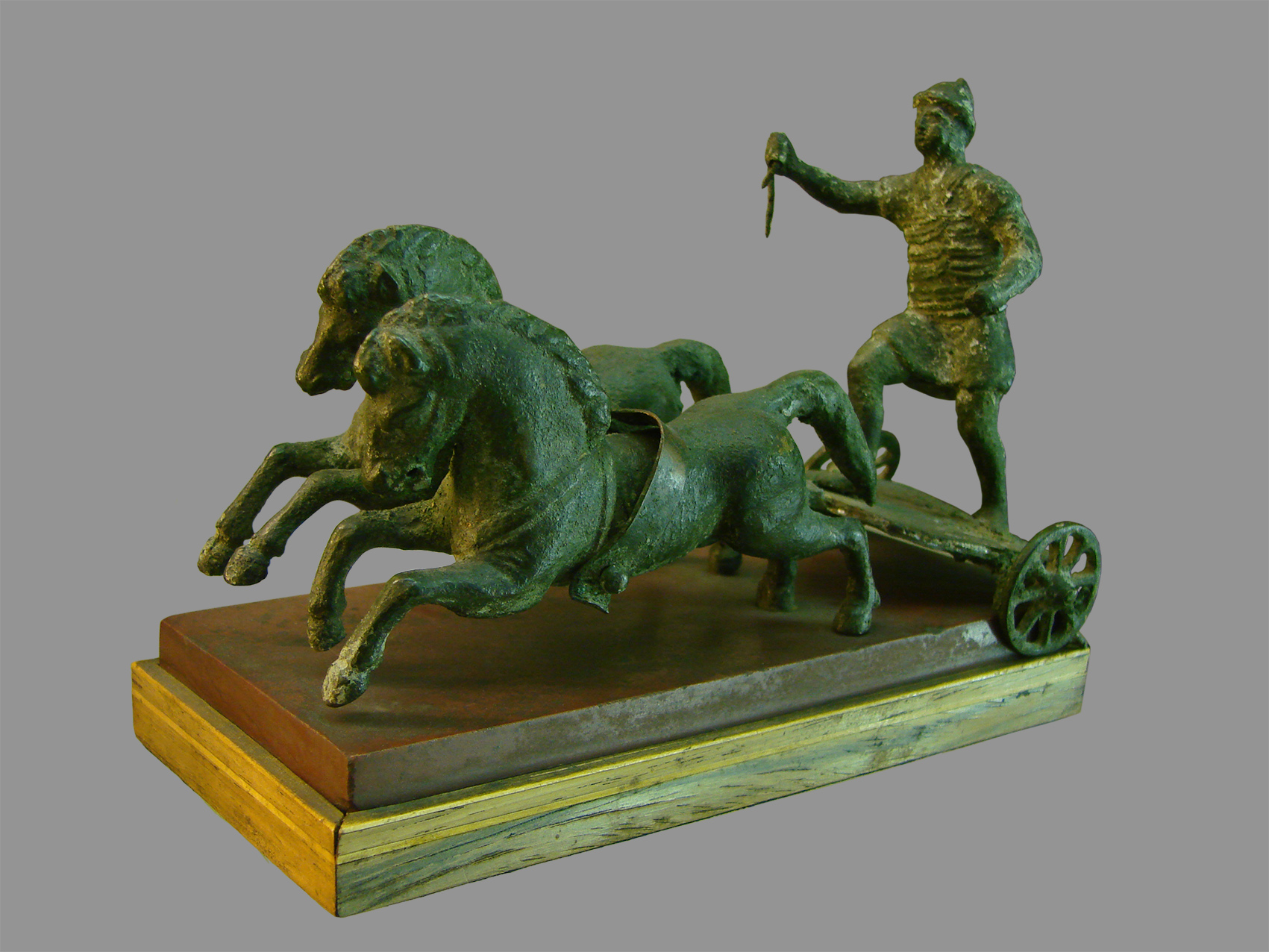 Bige en bronze, époque gallo-romaine. Musée de Laon.